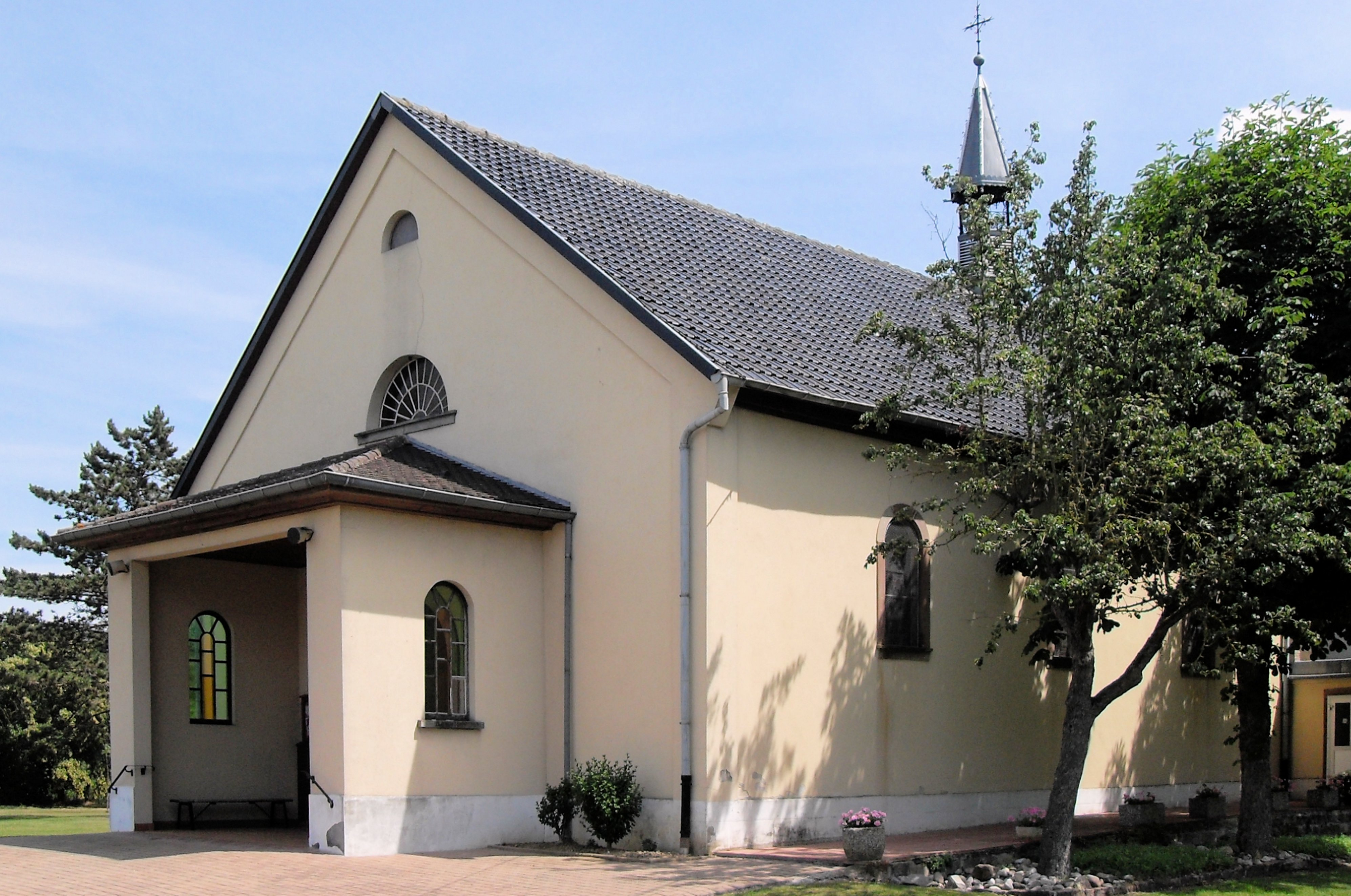 La chapelle Notre-Dame-de-Thierhurst et Notre-Dame-des-Douleurs à Heiteren